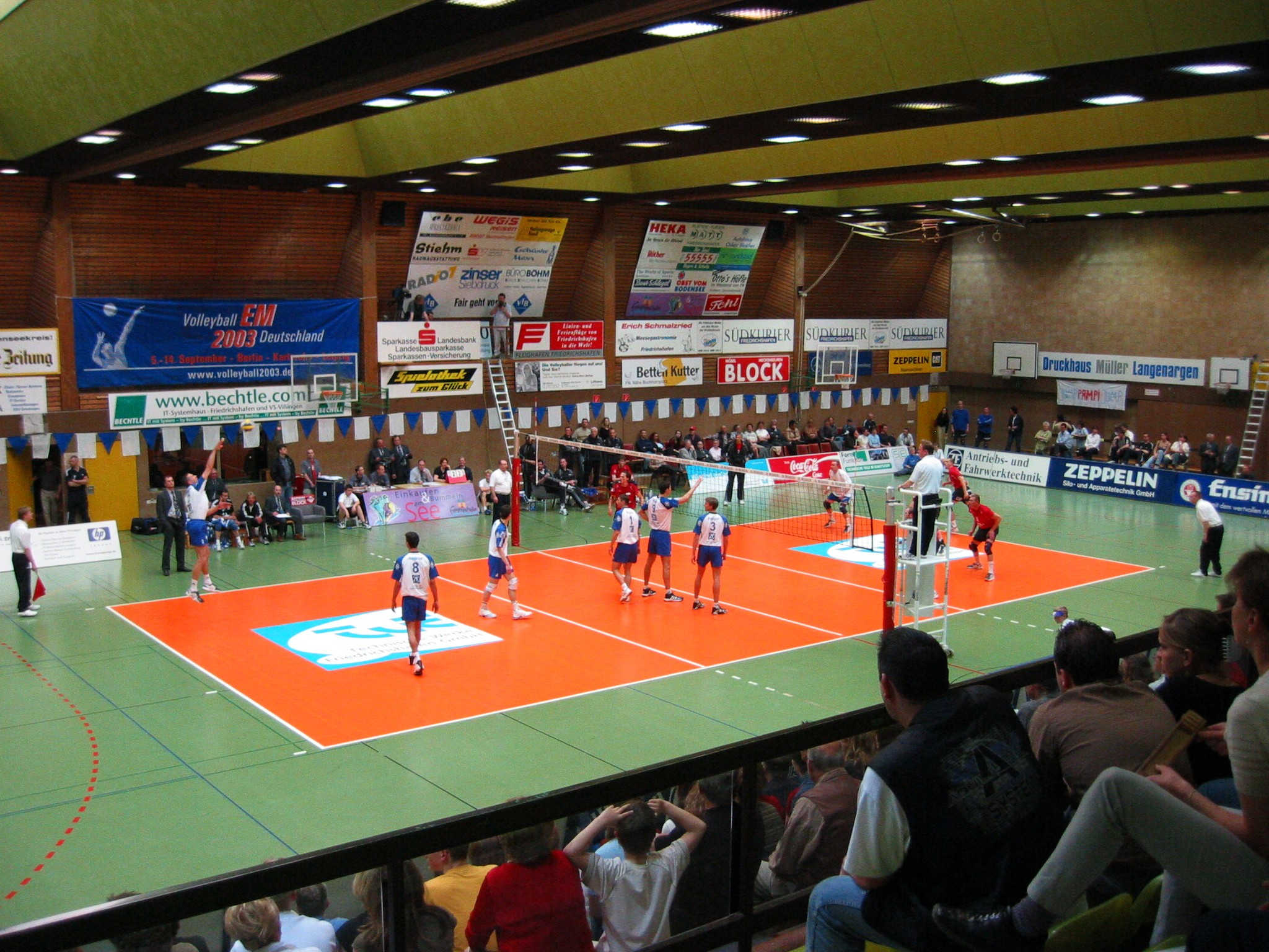 Volleyball game in the German Bundesliga, VfB Friedrichshafen vs. TSV Bad Saulgau, Bodenseehalle Friedrichshafen